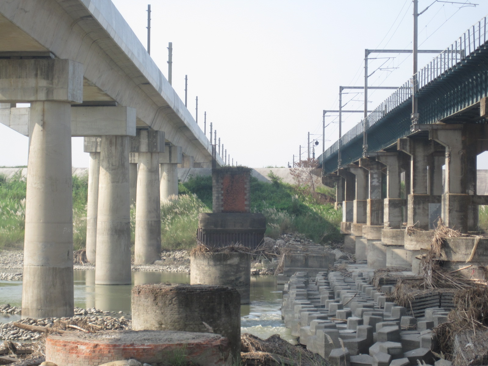 由左至右依序為第三代臺鐵曾文溪橋、第一代曾文溪鐵道橋橋墩遺跡、第二代臺鐵曾文溪橋（拍攝當時仍通行者）。